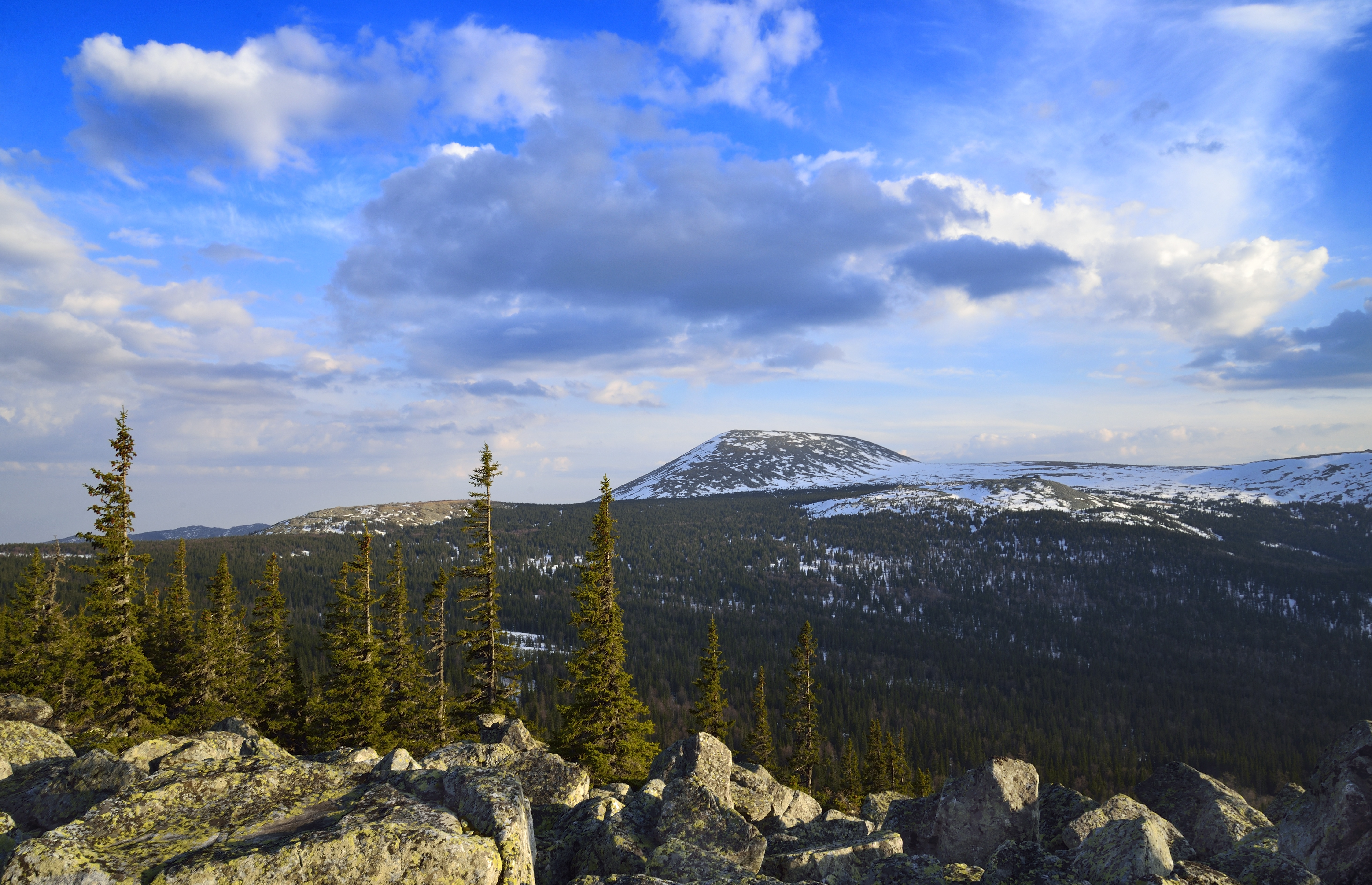 Гора Иремель, Белорецкий район This image is related to the protected area of Russia number 0210061